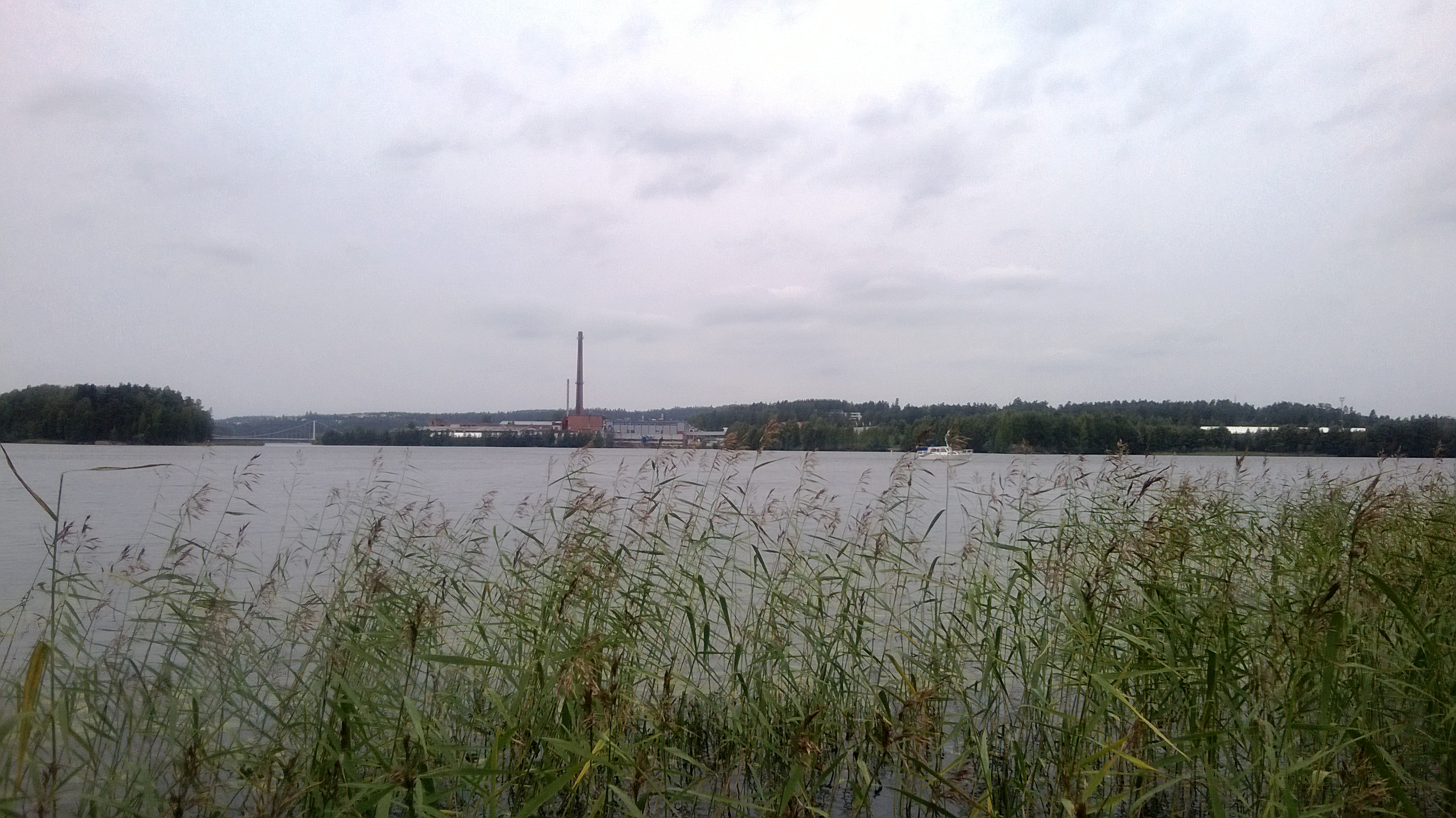 oik. Säynätsalo, keskellä Louhunsalmen riippusilta, vas. Lehtisaari